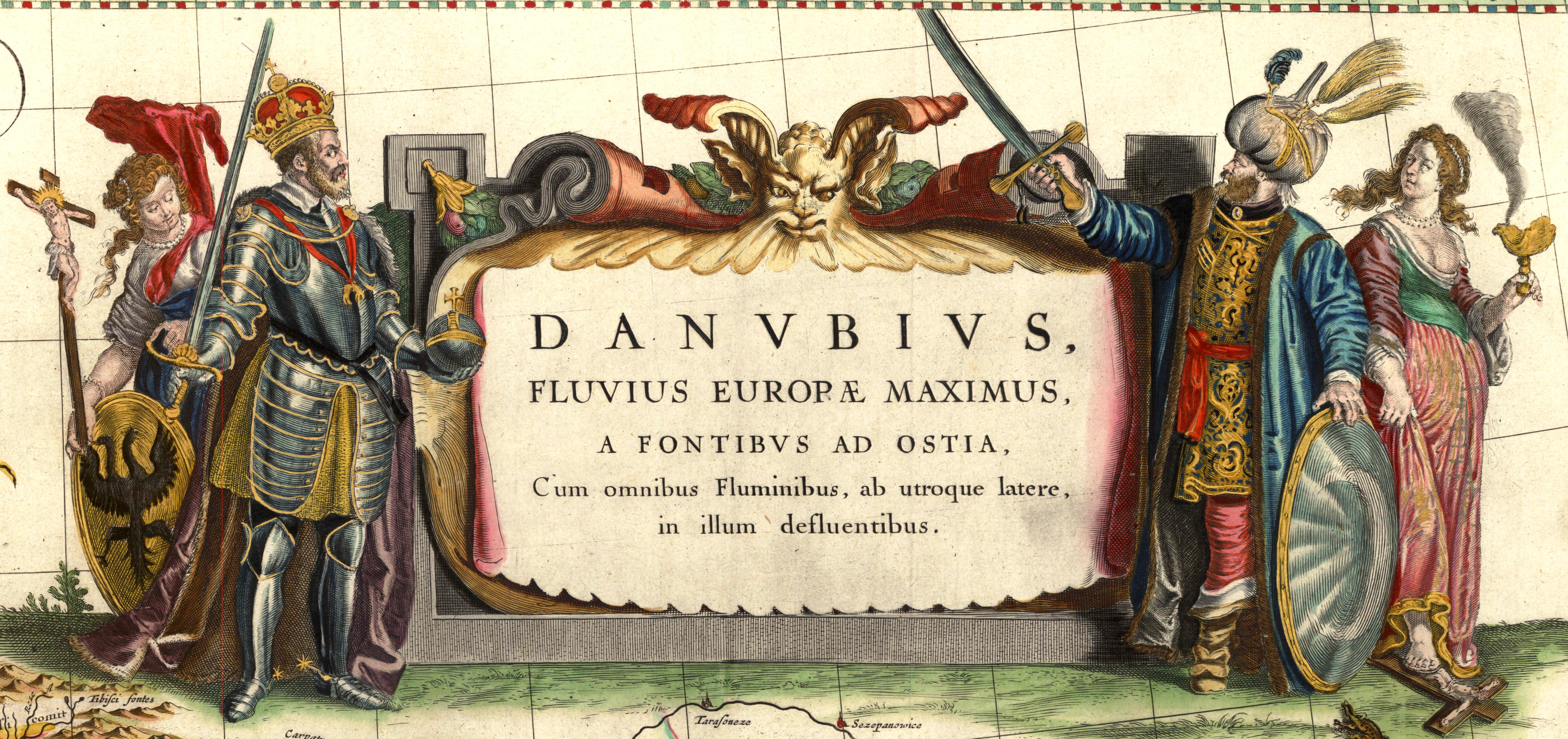 DANVBIVS, FLUVIUS EUROPAE MAXIMUS, A FONTIBVS AD OSTIA térképkivágás Willem Jansz Blaeu (1571-1638) 1635-ben közzé tett DANVBIVS, FLUVIUS EUROPAE MAXIMUS térképének részlete